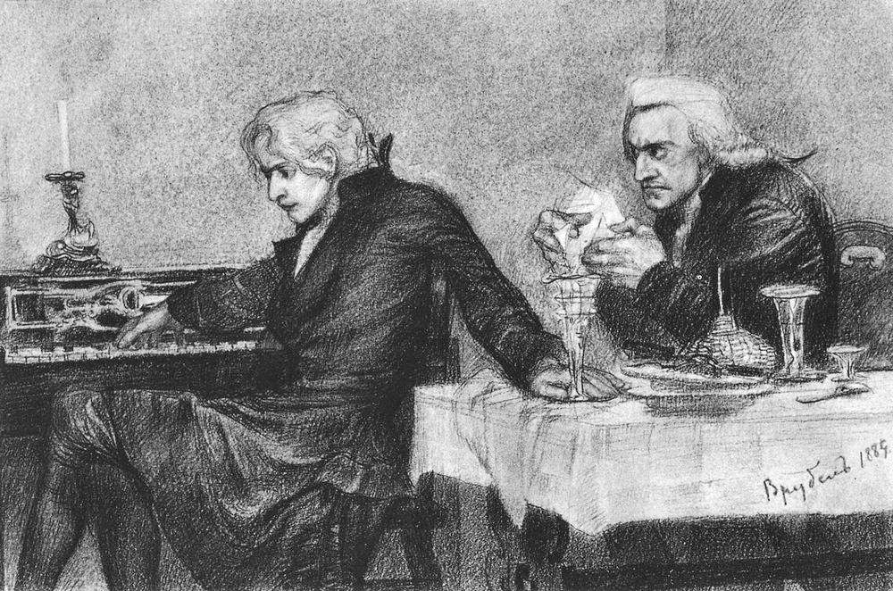 Моцарт и Сальери. Рисунок 1884